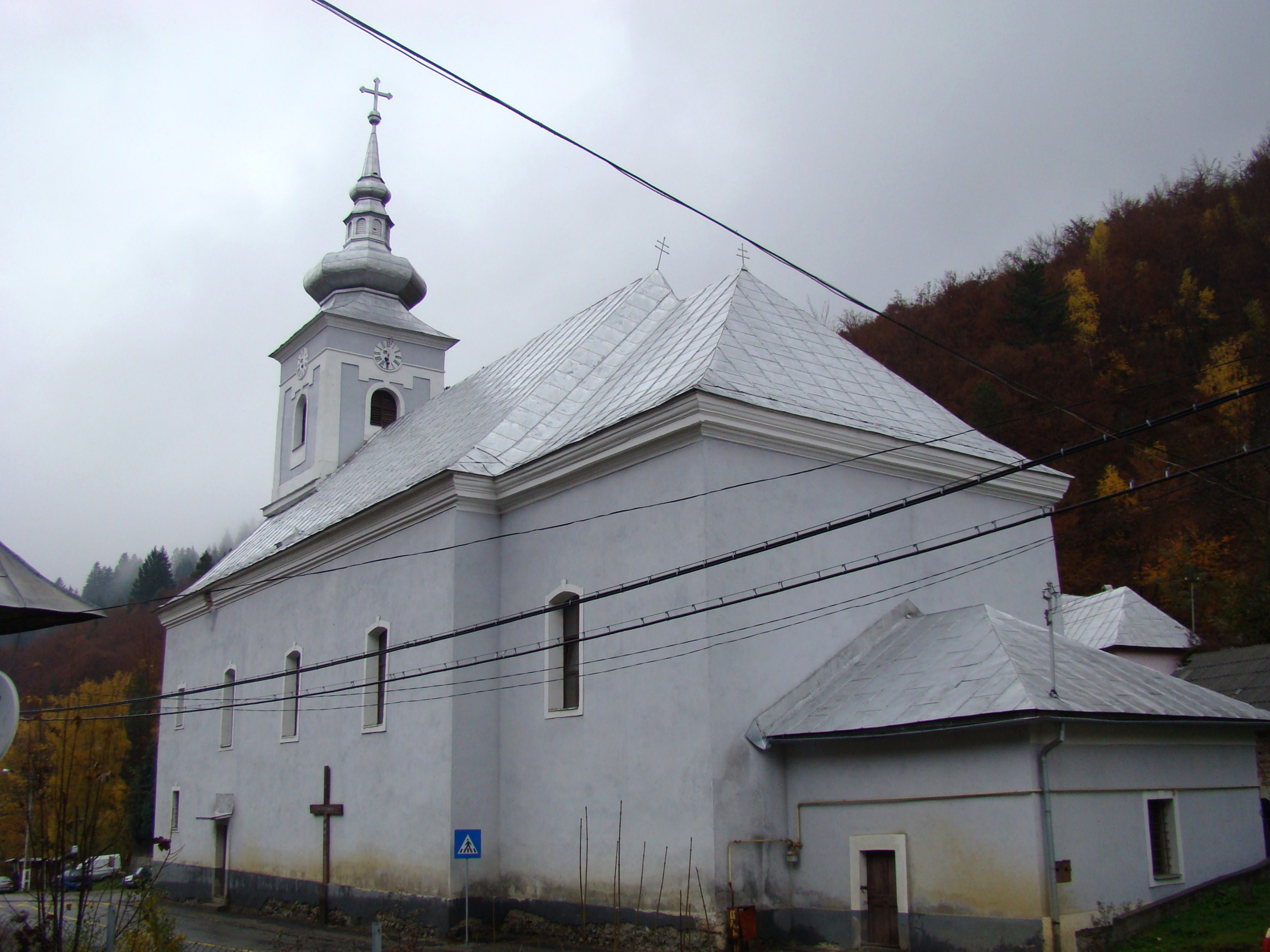 Biserica romano-catolică „Sfânta Varvara” (Szent Borbála) din Cavnic, județul Maramureș